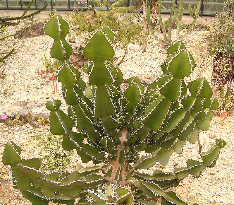 Euphorbia cooperi var. cooperi, BG Bochum, Germany